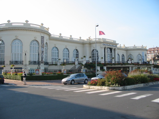 Casino de Deauville